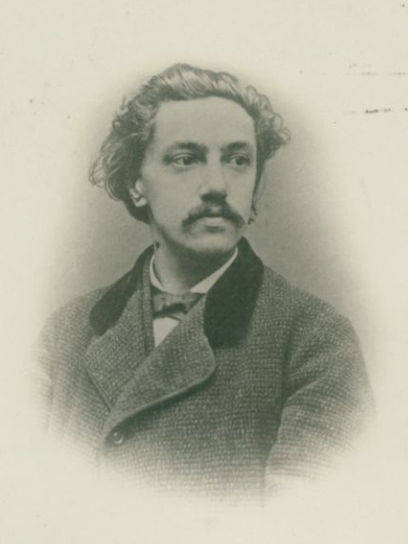 Jan Bolhuis van Zeeburgh (1836-1880)